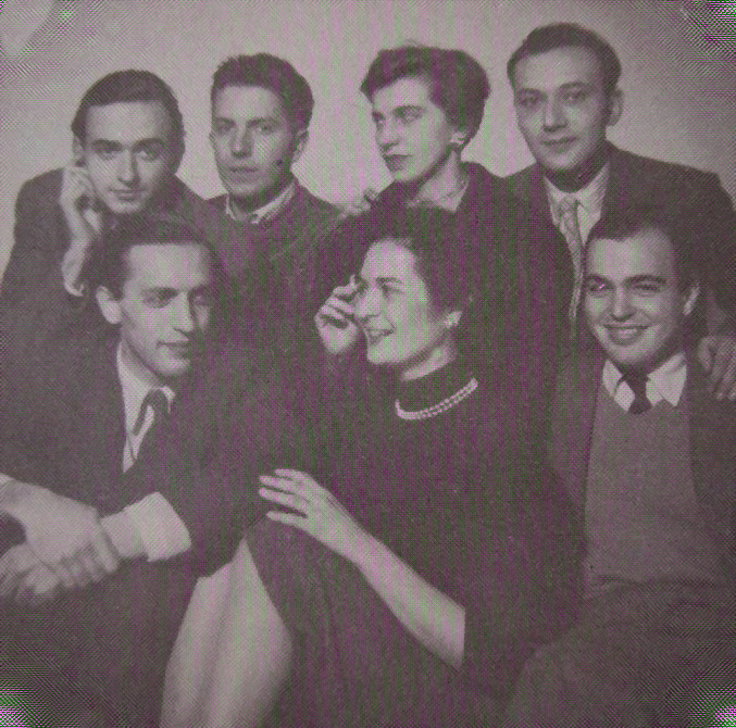 Grupo OAM. Arriba, de izquierda a derecha: Francisco Bullrich, Eduardo Polledo, Alicia Cazzaniga y Jorge Goldemberg. Abajo, de izquierda a derecha: Horacio Baliero, Carmen Córdova y Jorge Grisetti. En la foto no aparecen otros miembros del estudio, como Juan Manuel Borthagaray, Alberto Casares Ocampo y Gerardo Clusellas.